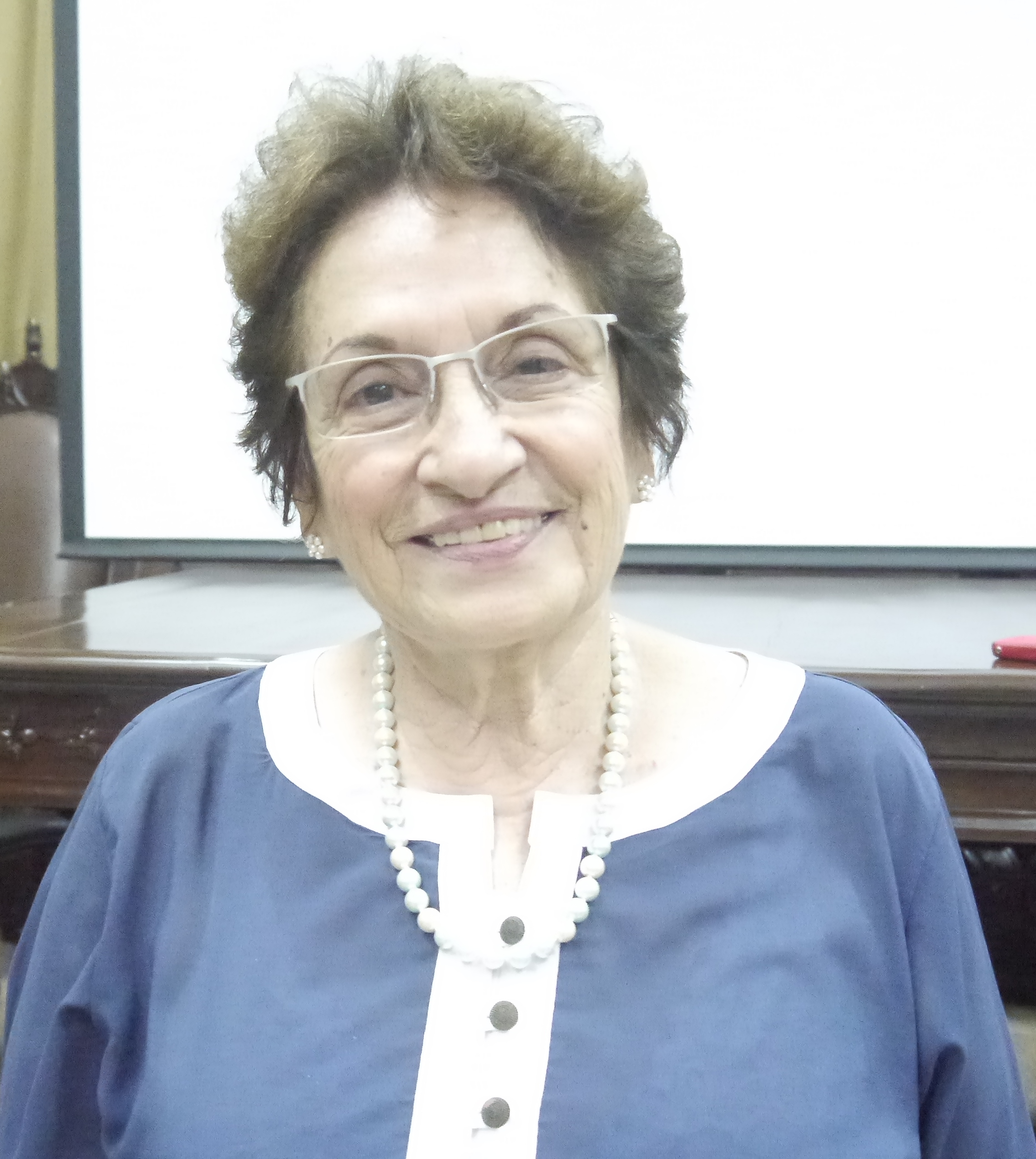 Nelsa Curbelo, escritora uruguaya radicada en Ecuador